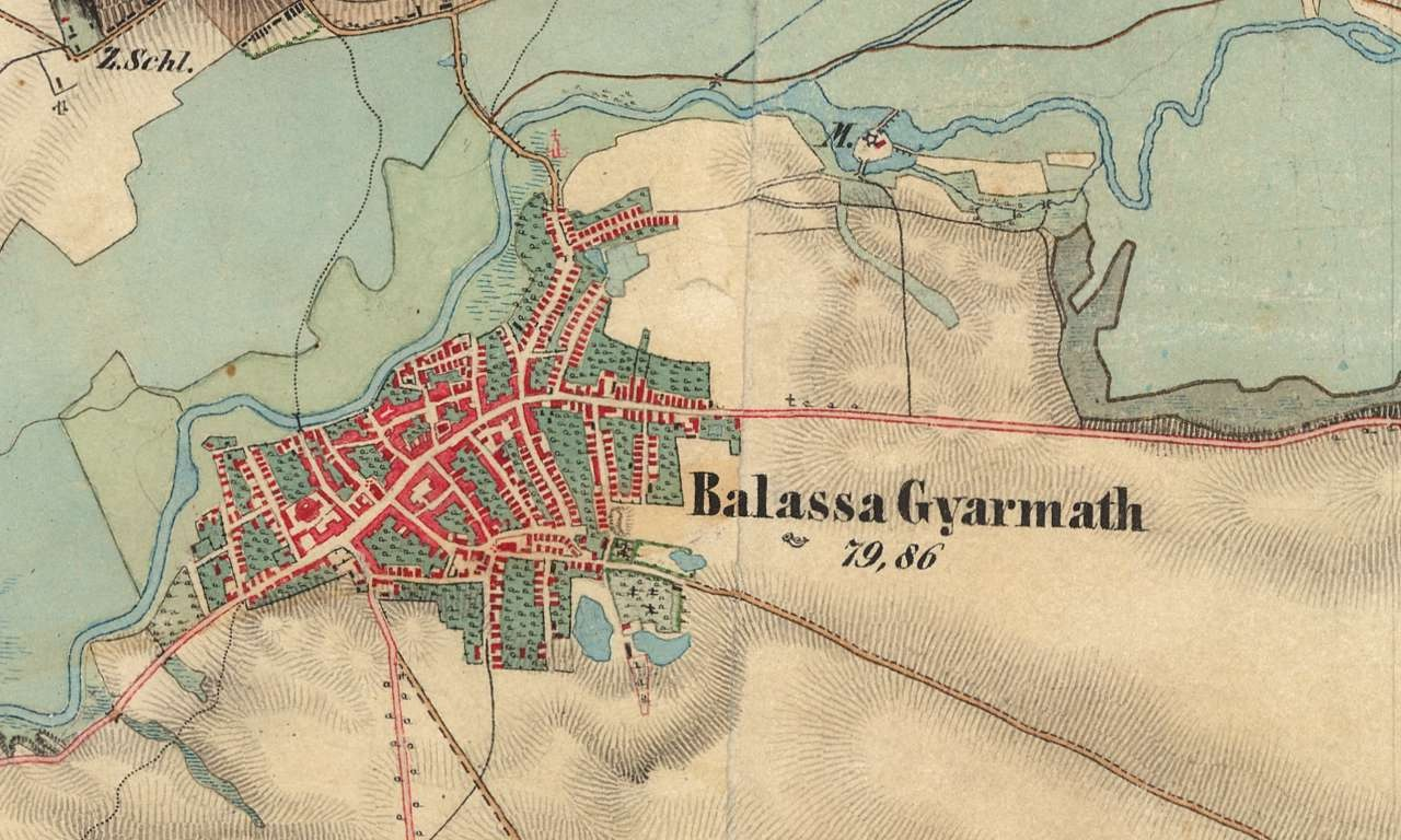 A második katonai felmérés egyik szelvénye, a térképen Balassagyarmat látható